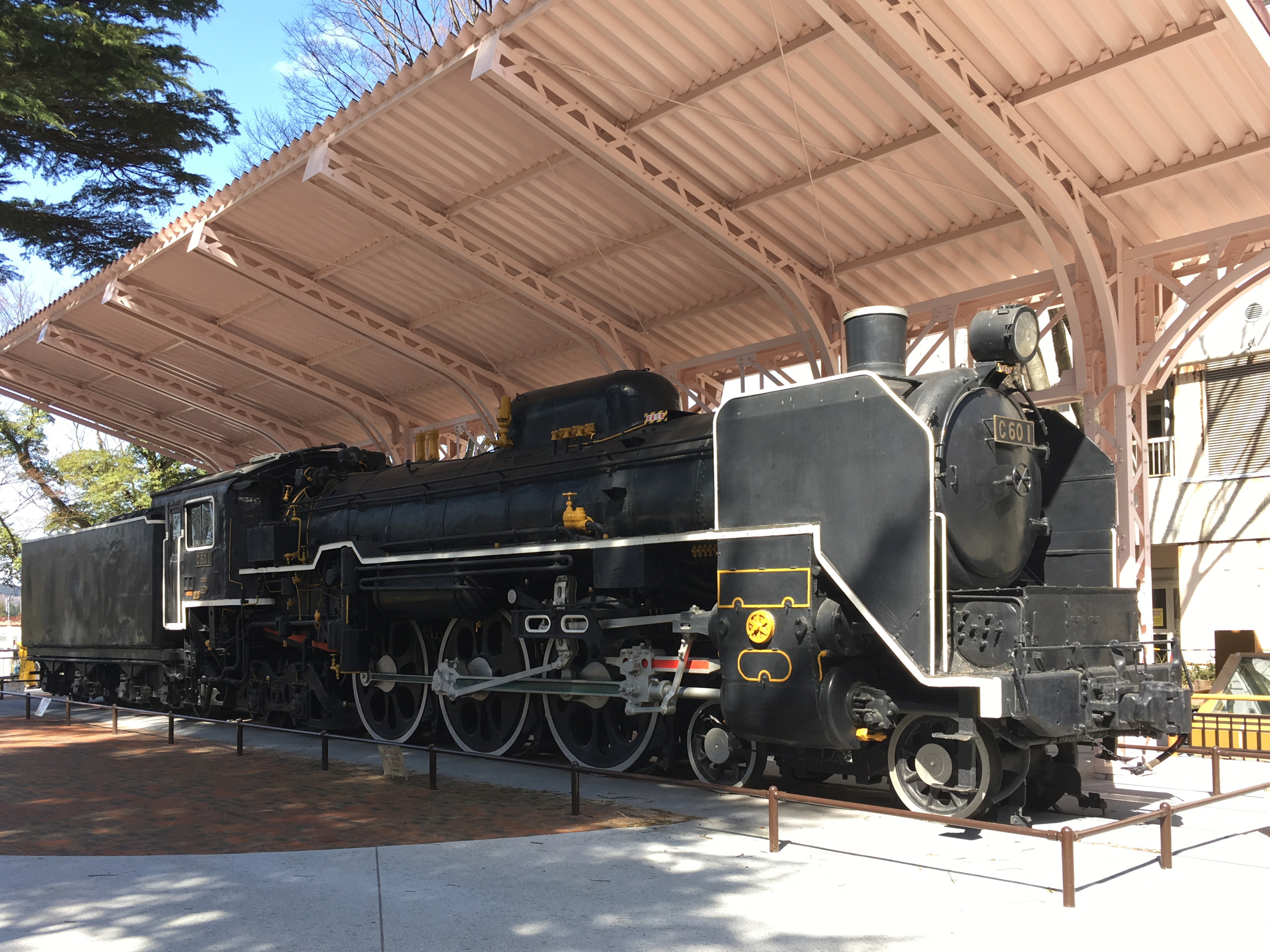 仙台市で保存されているC60 1（2018年撮影）